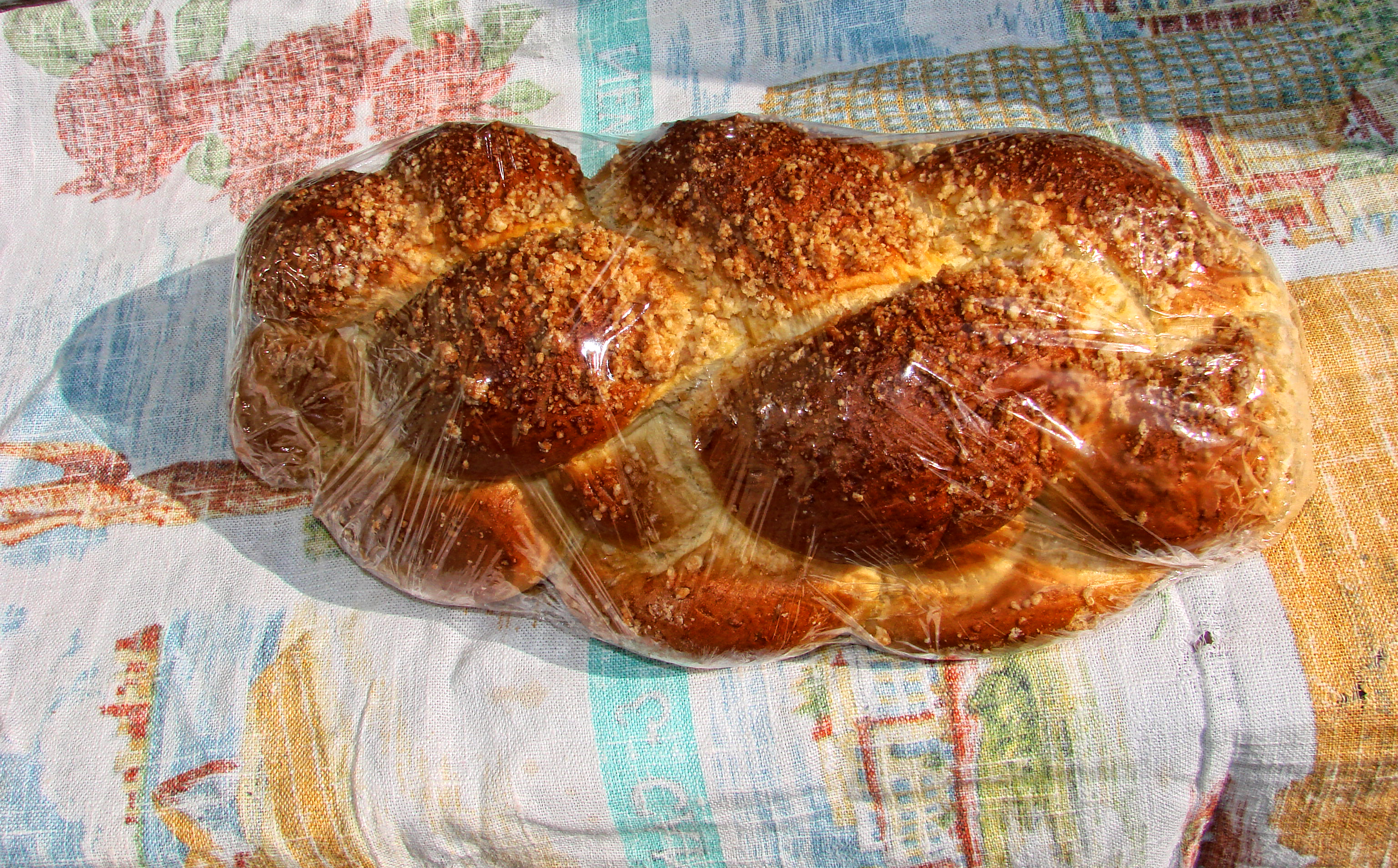 bułka